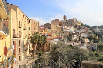 Veduta del centro storico di Patti